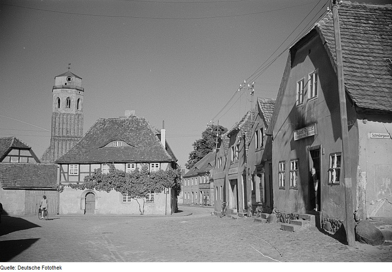 Original image description from the Deutsche Fotothek Ortsansicht von Calau mit der Stadtkirche